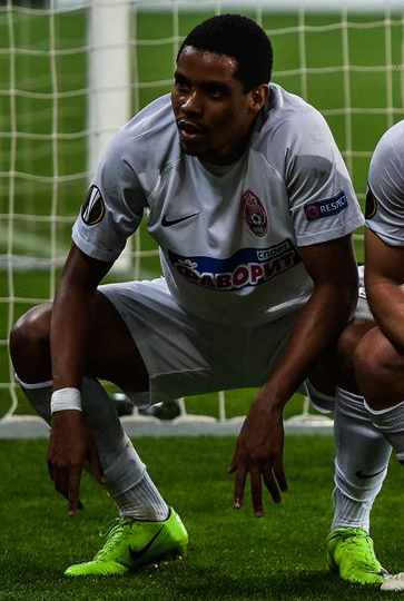 Заря - Герта 2:1